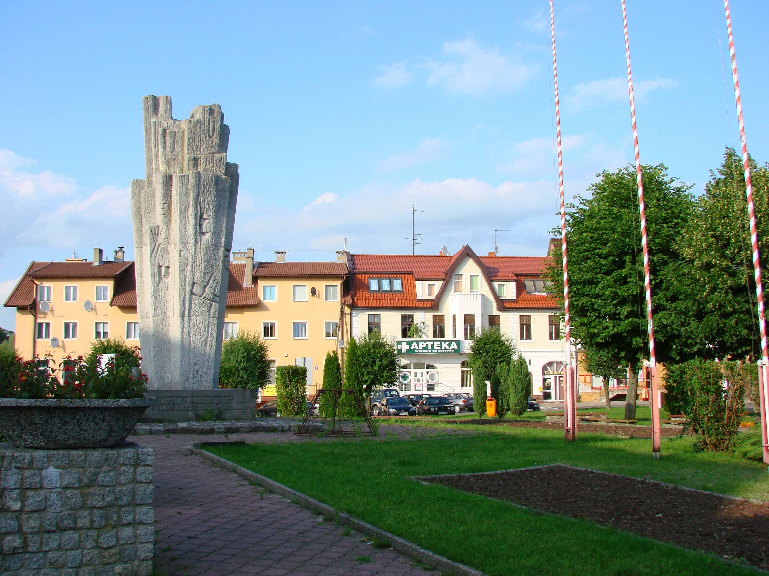 Pomnik na trójkątnym Starym Rynku, ku pamięci poległych w walkach o niepodległość miasta, ul. Pl. Wolności. Monument in Sępólno Krajeńskie, Poland.